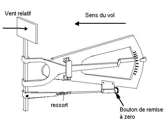 Anemometer_Etévé_drawing drawing by Jaypee